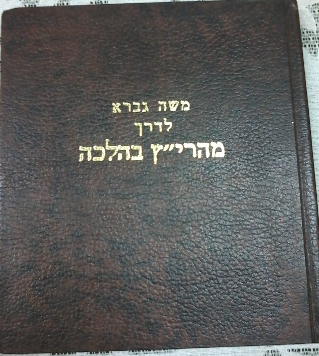 חיבור ראשון של ד"ר משה גברא